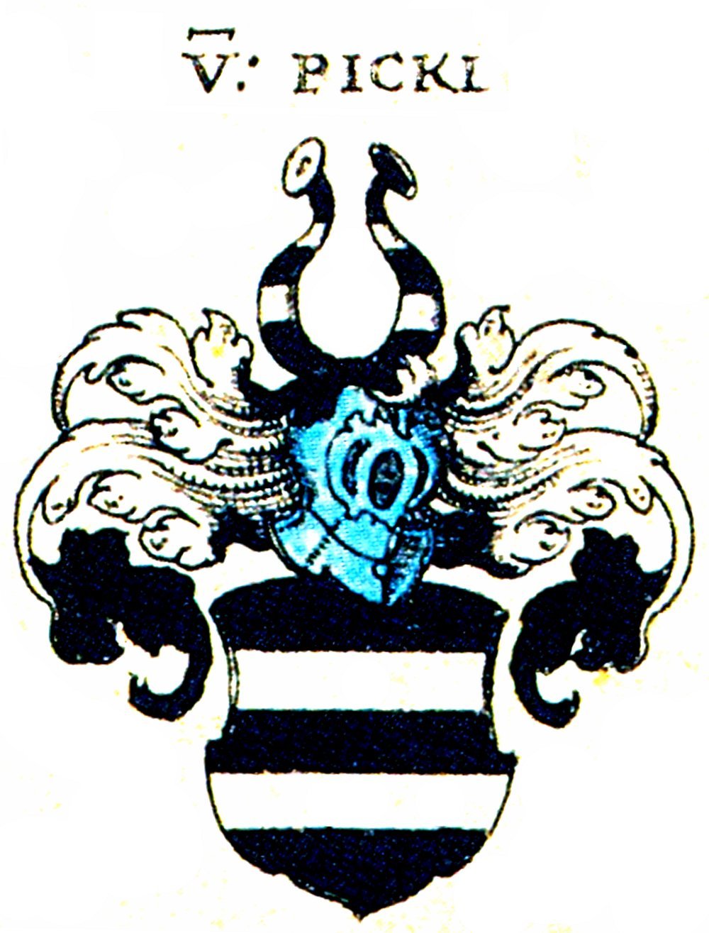 Wappen Anselm von Bicken nach Siebmachers Wappenbuch